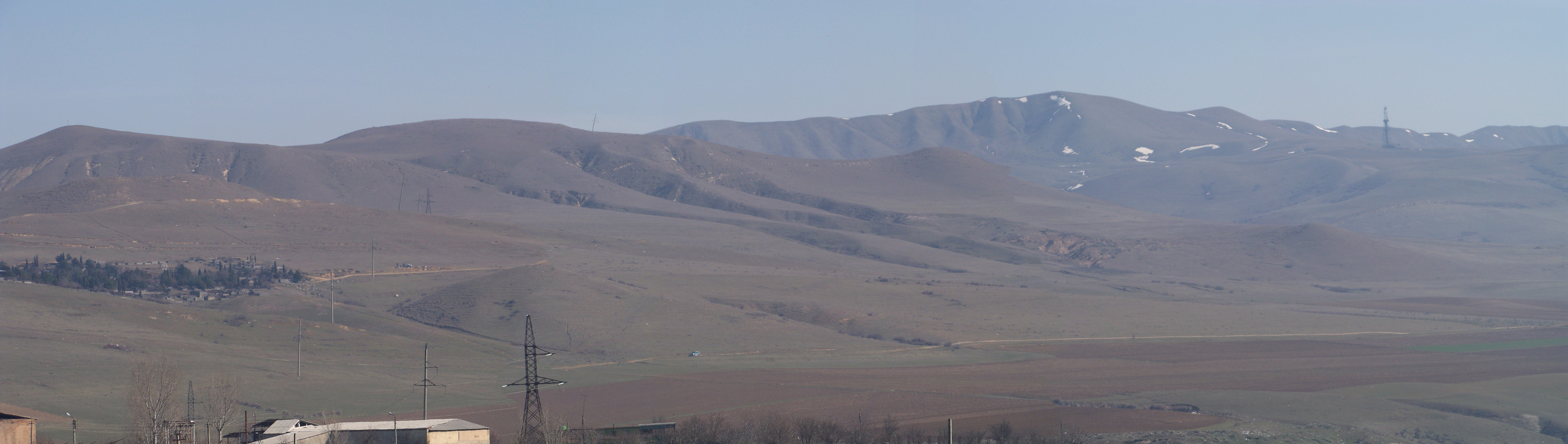 კვერნაქის ქედის პანორამა